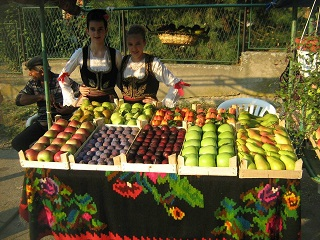 Дани села